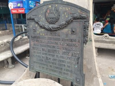 sitio desde el cual, en la mañana del 5 de noviembre de 1811, lanzo el primer grito de independencia de centro america14 de diciembre de 1947